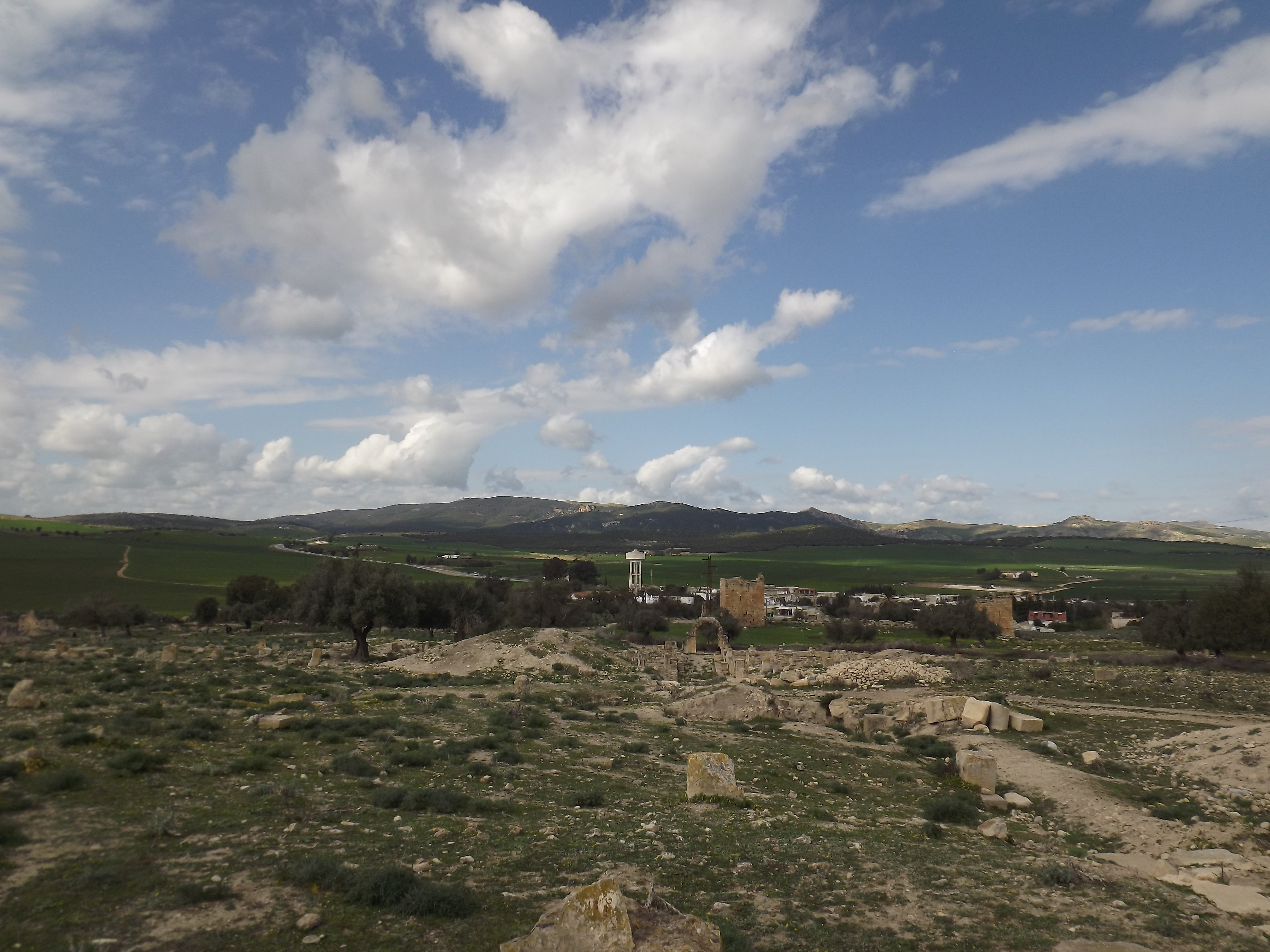 Le site archéologique de ain tounga